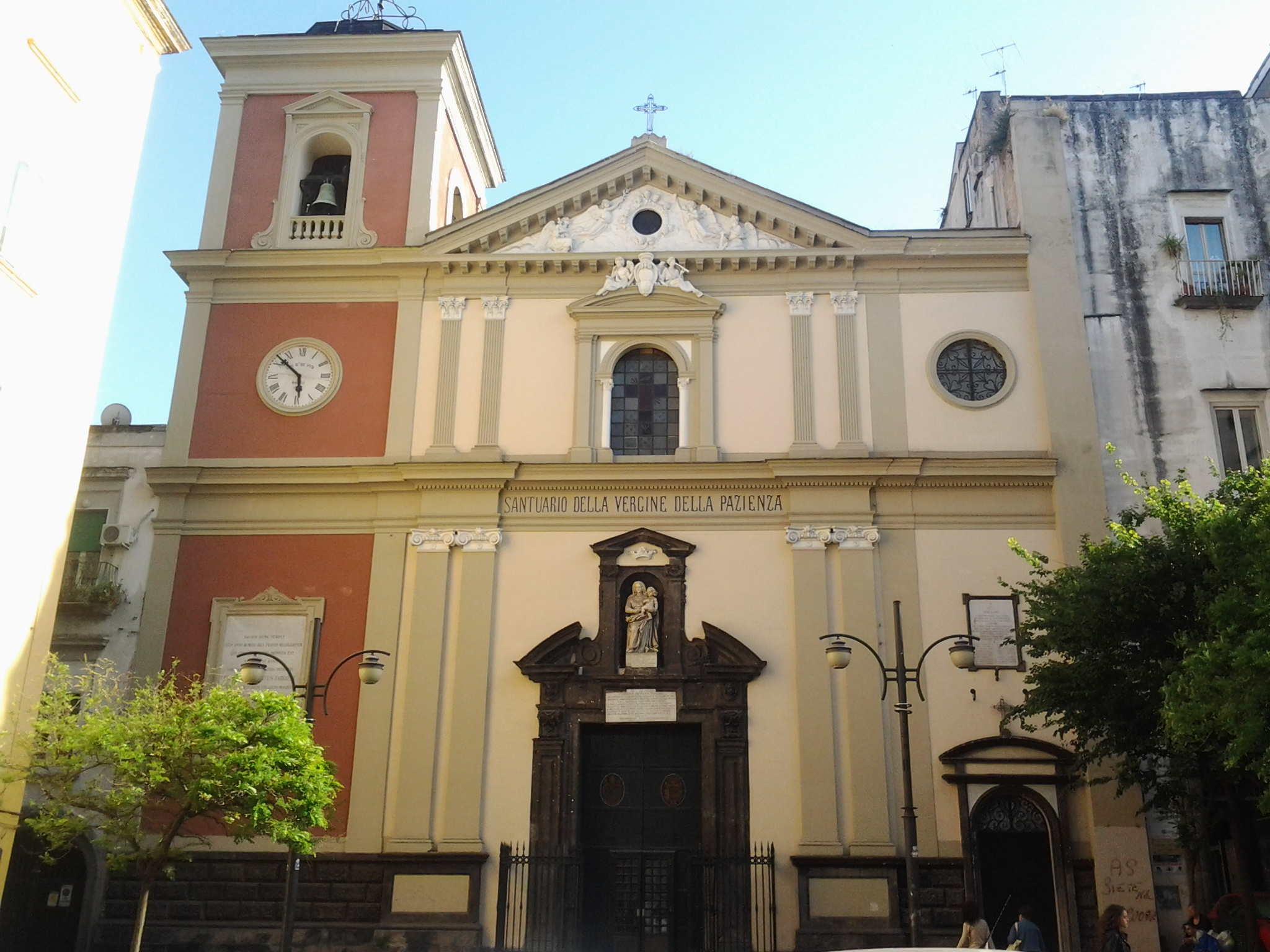 Facciata S. Maria della Pazienza, Napoli